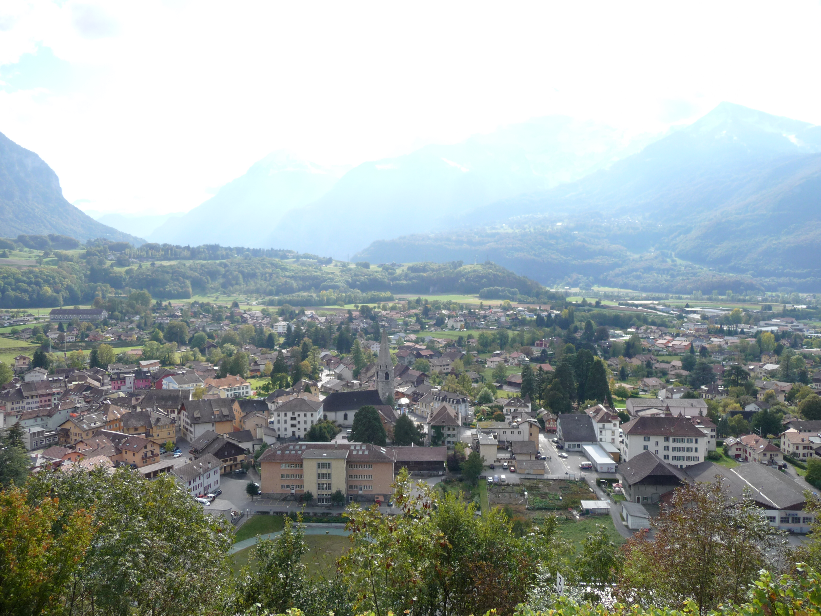 Bex.